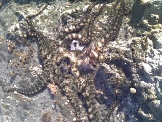 Pulpos